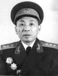 叶飞授衔照